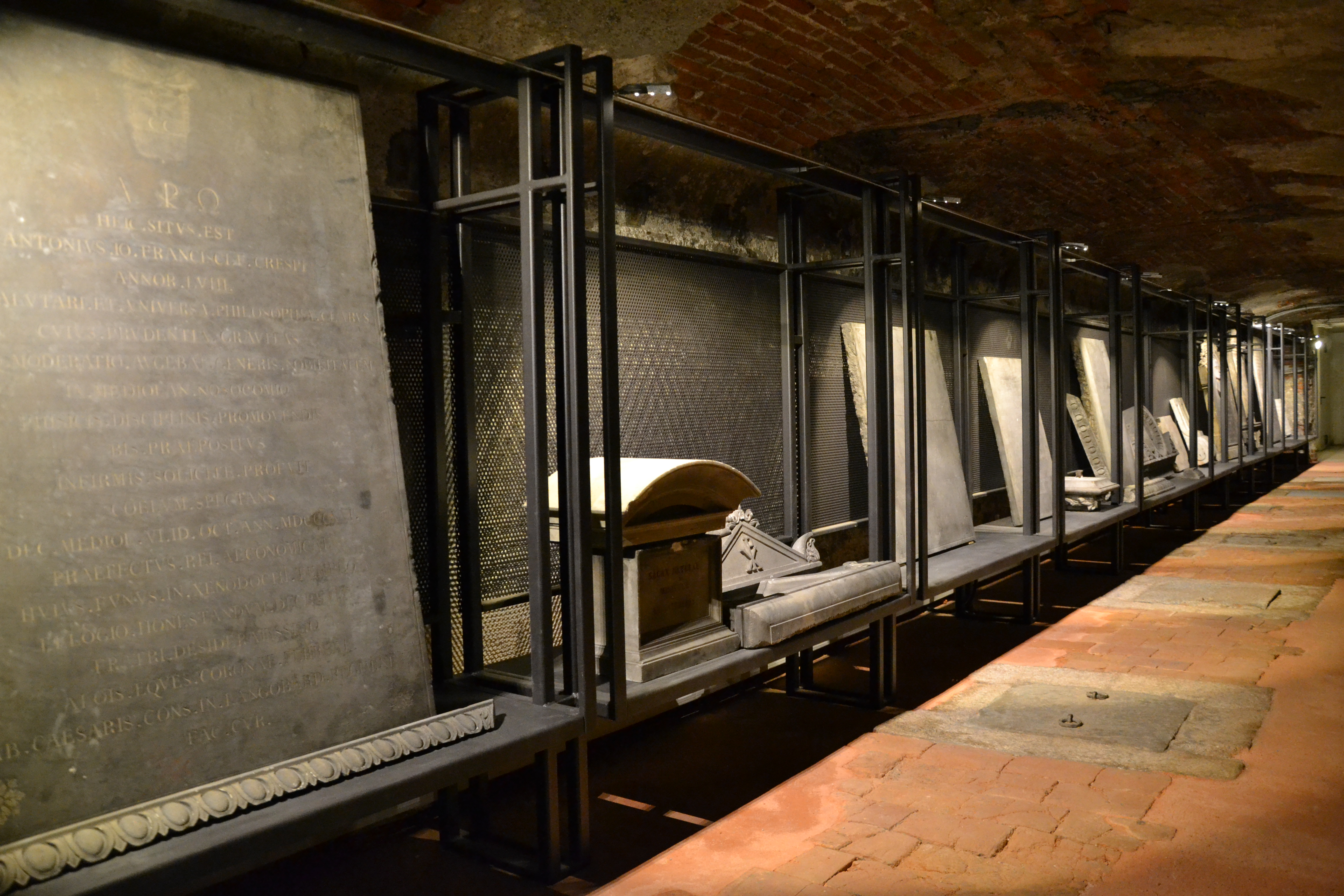 Milano - Università Statale, S. Maria Annunciata